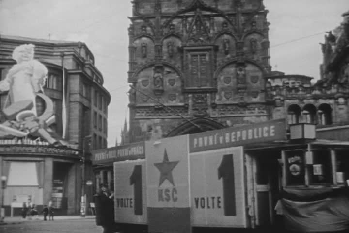 KSČ získala volební číslo "1", záběr z amerického filmového týdeníku "The March of Time".